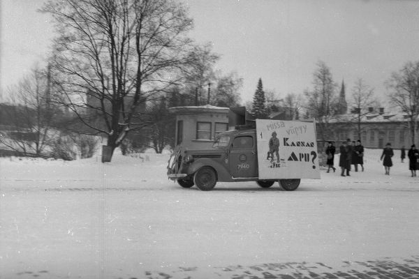 Kansanavun mainosauto kiertämässä Tampereella 1947, julkaistu Aamulehdessä